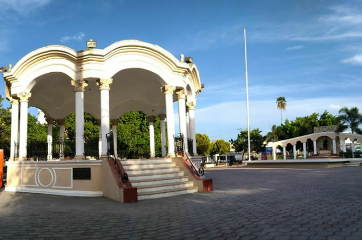 Parque, San Fernando, Tamaulipas, Mexico.